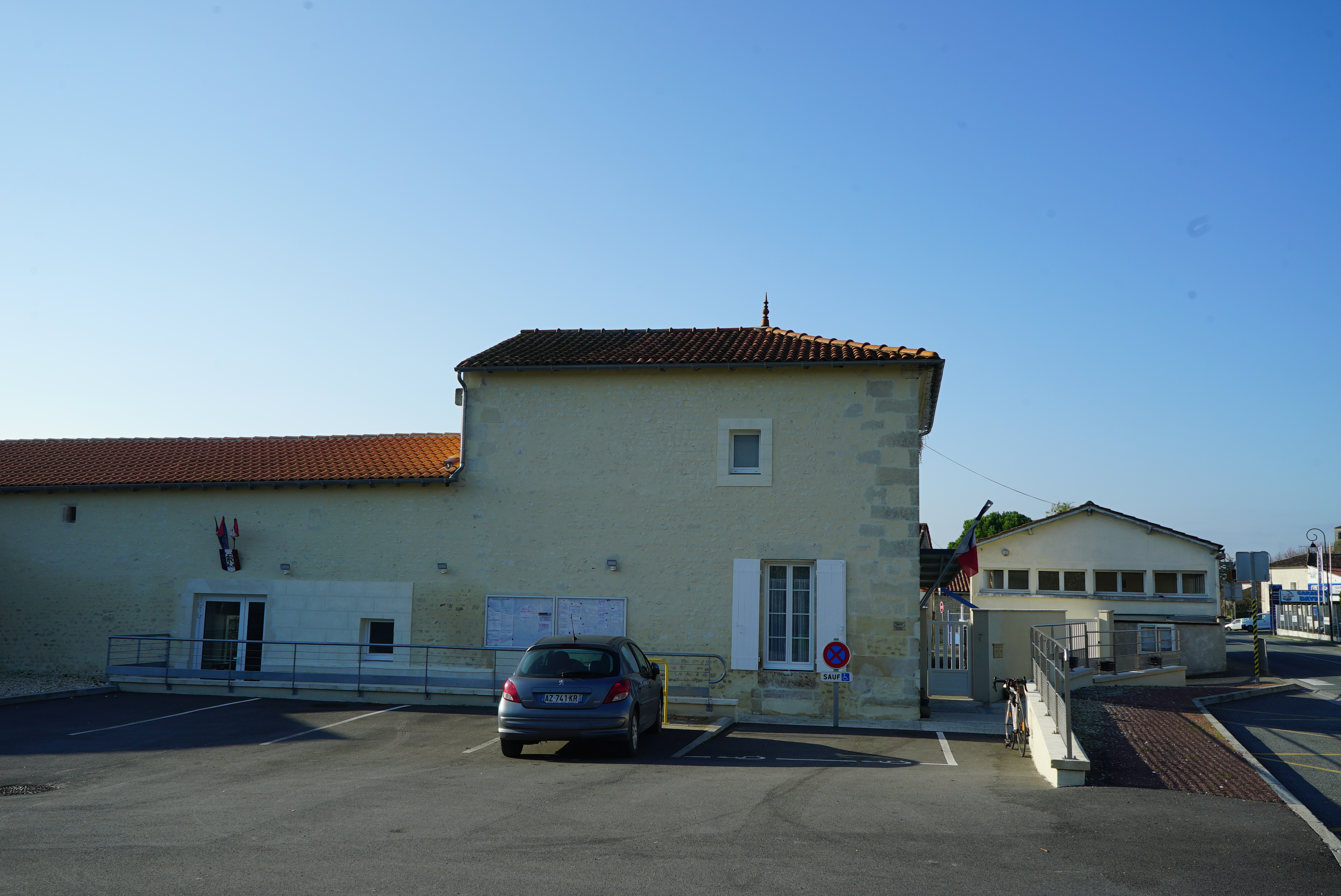 vue de la mairie de Bougneau.